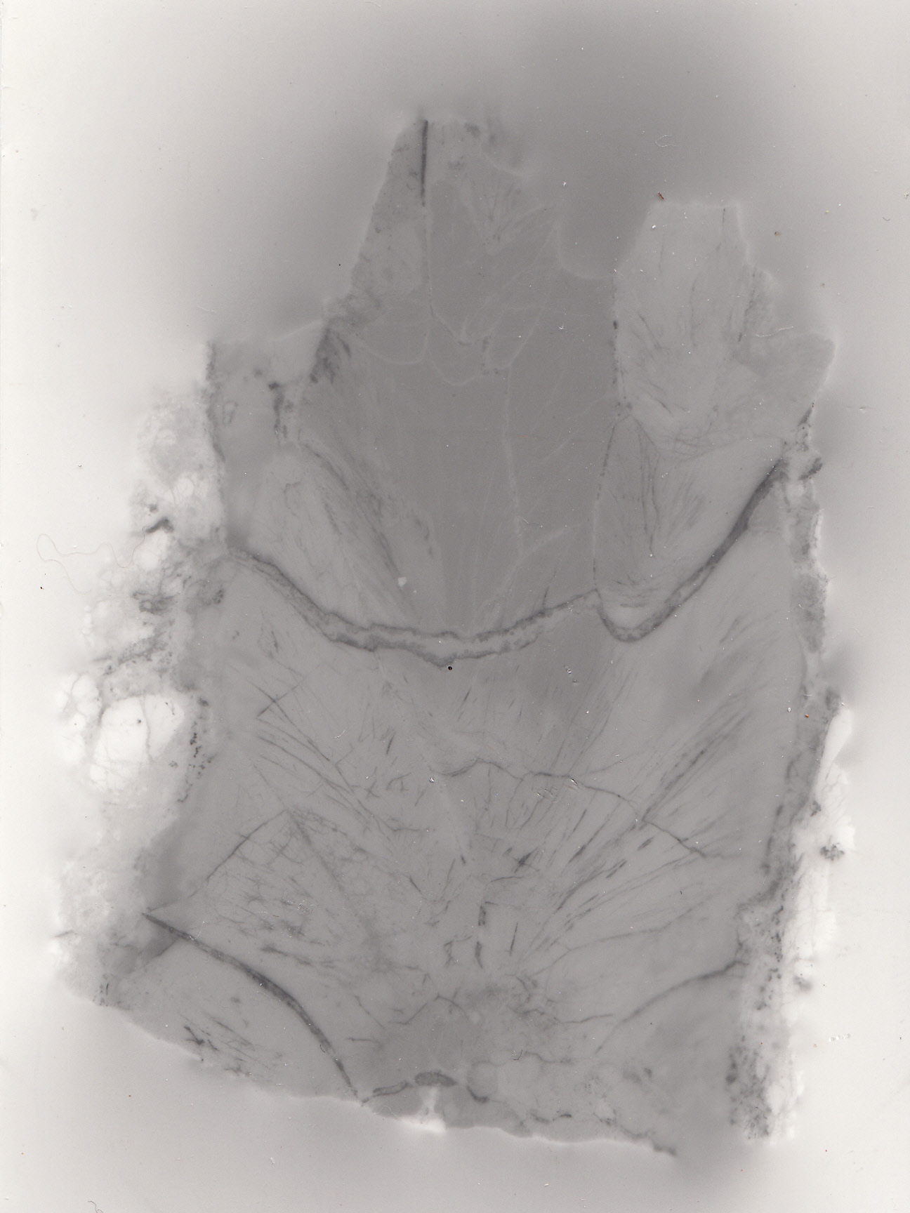 Il s'agit de l'expérience de Becquerel. Le papier photographique (papier Kodak noir et blanc pour agrandissement) a été enveloppé dans du papier (opaque) d'aluminium. La partie plane de la pechblende a été posé sur la plaque sensible. Durée d'exposition : 24 heures.